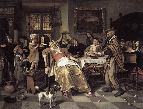 Driekoningenfeest